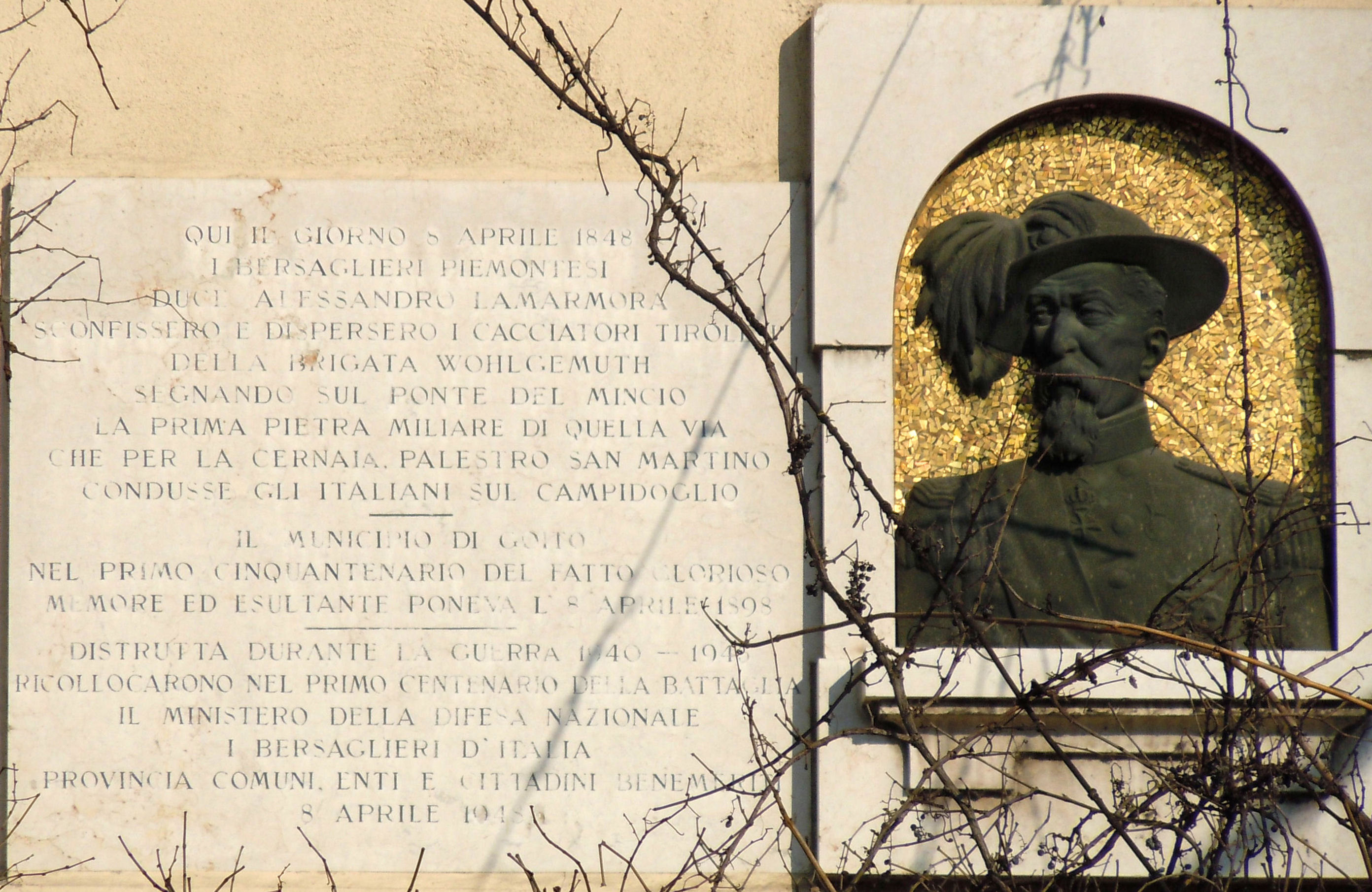 Goito, lapide ad Alessandro Lamarmora.